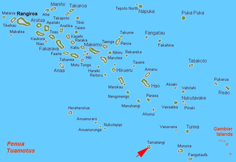 Tematangi - Tuamotus Locator Map